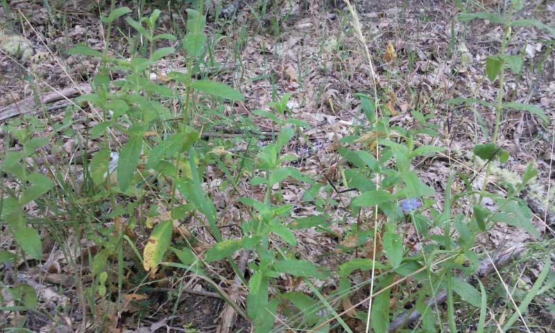 O Reboledo (Ourense)